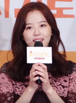 '치킨로드'는 '치느님'이라고 숭배되는 소울푸드 '치킨'의 특별한 레시피 발굴을 위해 프랑스, 미국, 페루, 인도네시아의 치킨 요리에 숨겨진 이야기와 맛의 기록을 찾아 떠나는 닭학다식 견문록 프로그램입니다.